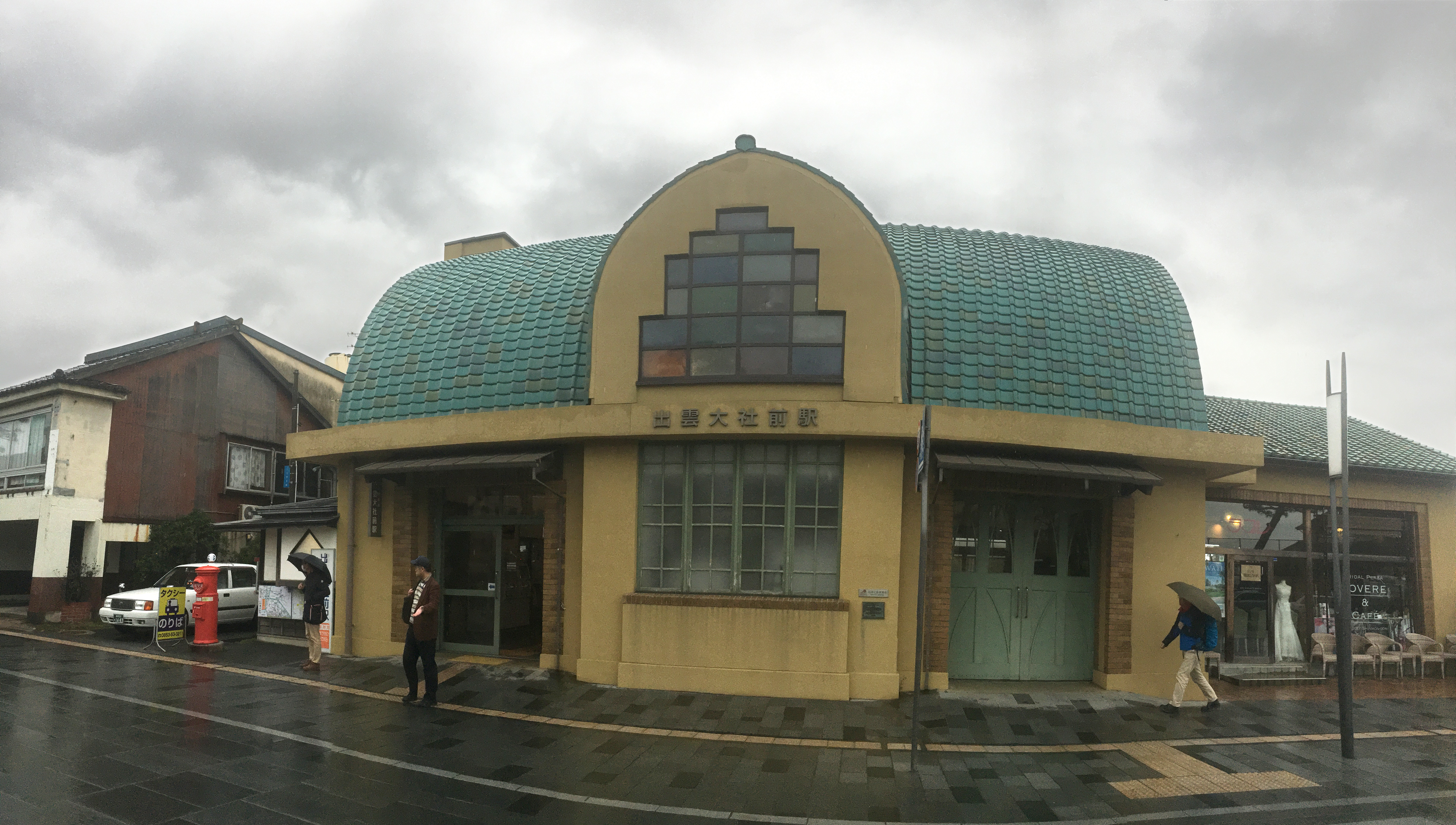 Izumo Taisha-mae Station (出雲大社前駅)